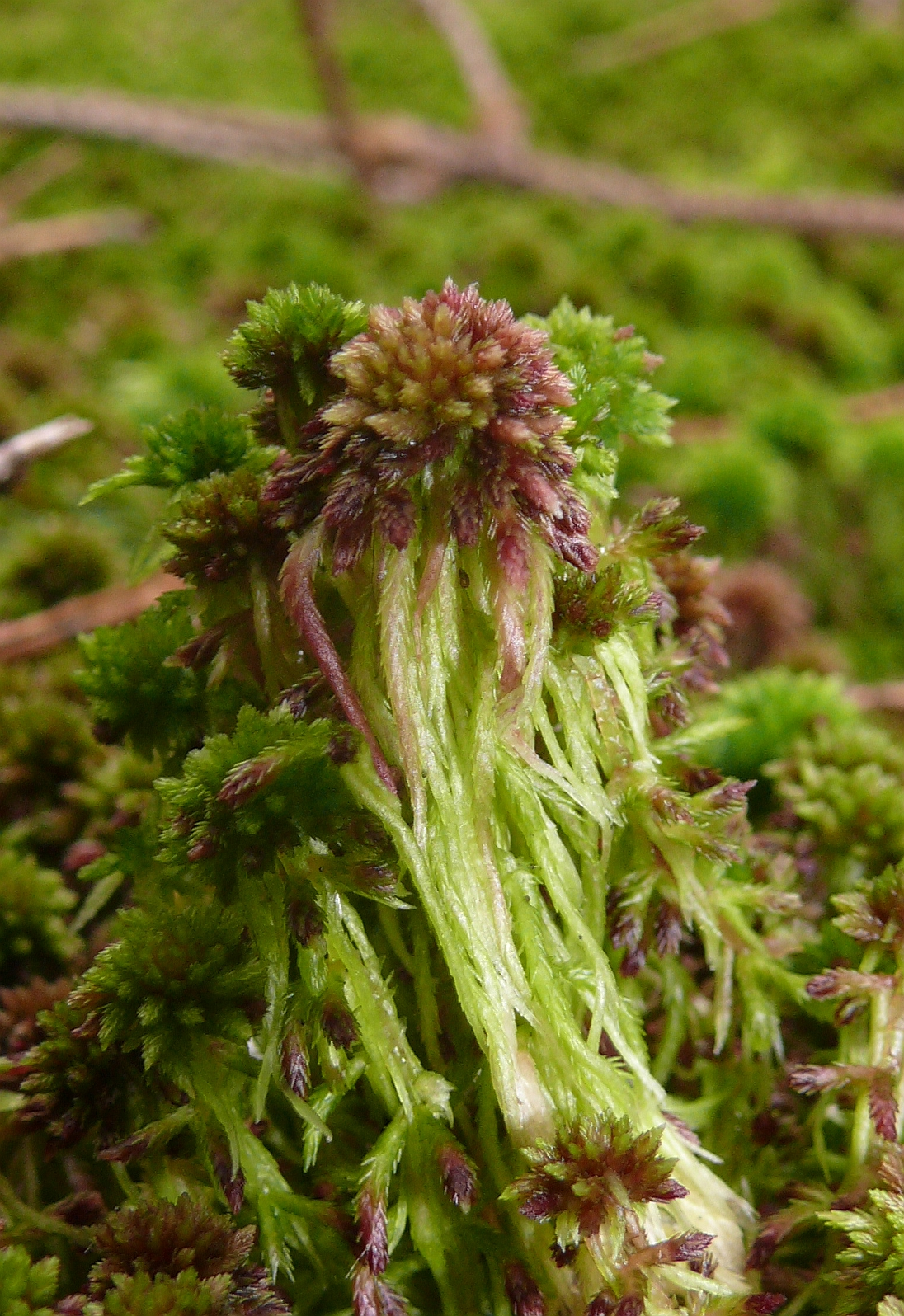 Spagnum capillifolium, Schwäbisch-Fränkische Waldberge, Germany